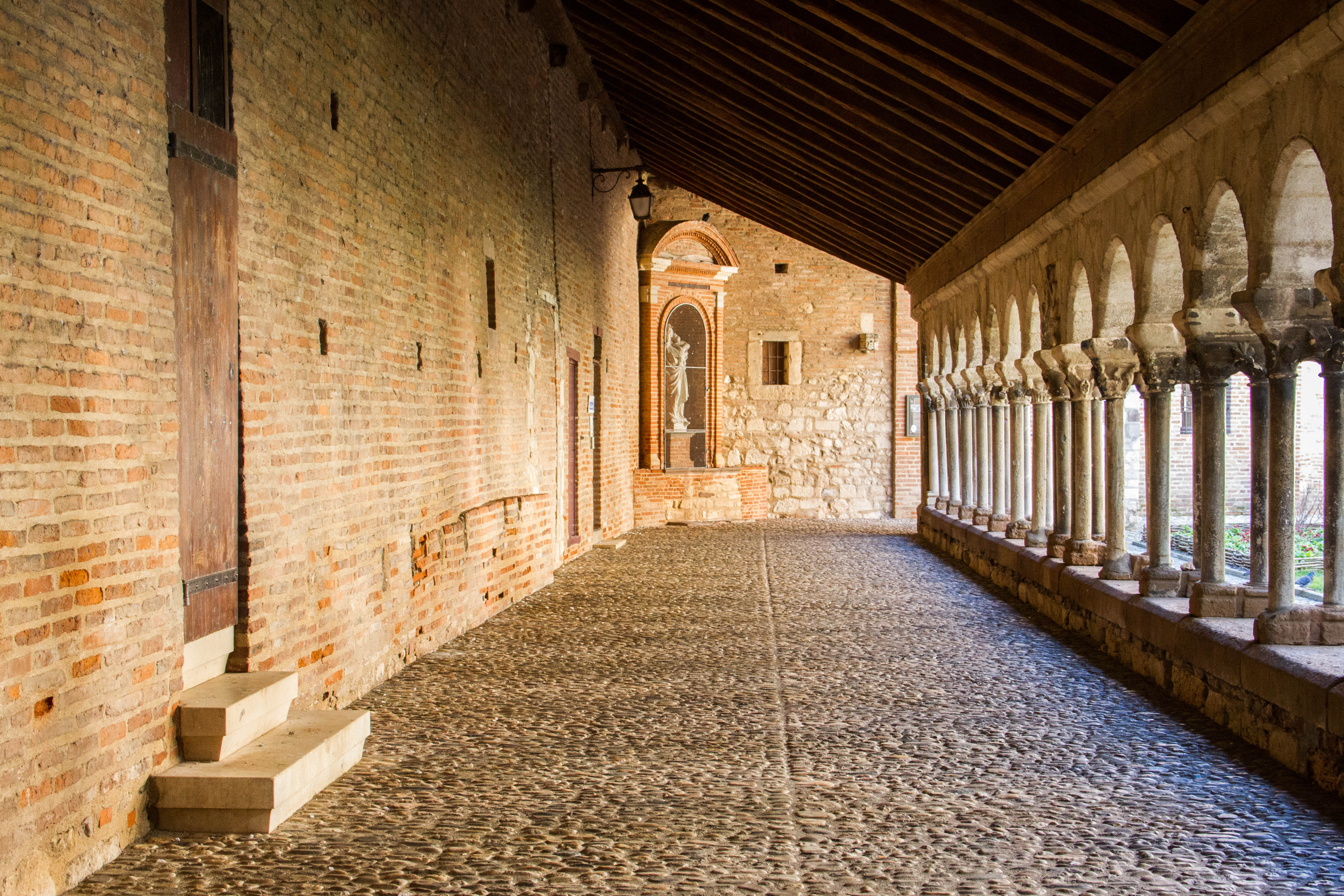 Collégiale Saint-Salvy (Albi)